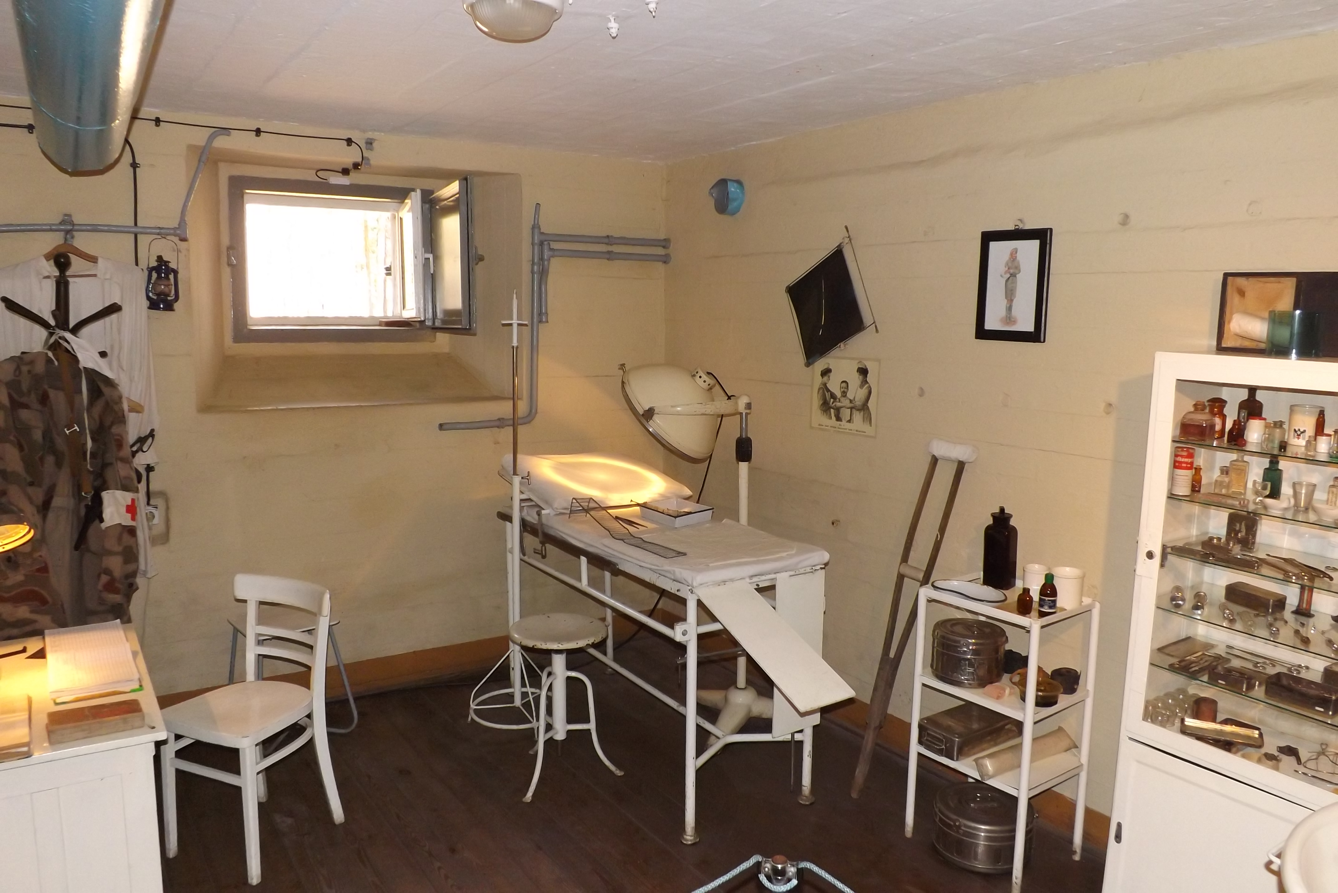 Hel, stanowisko bojowe B2 (bateria artyleryjska "Schleswig-Holstein"), 1939-1945